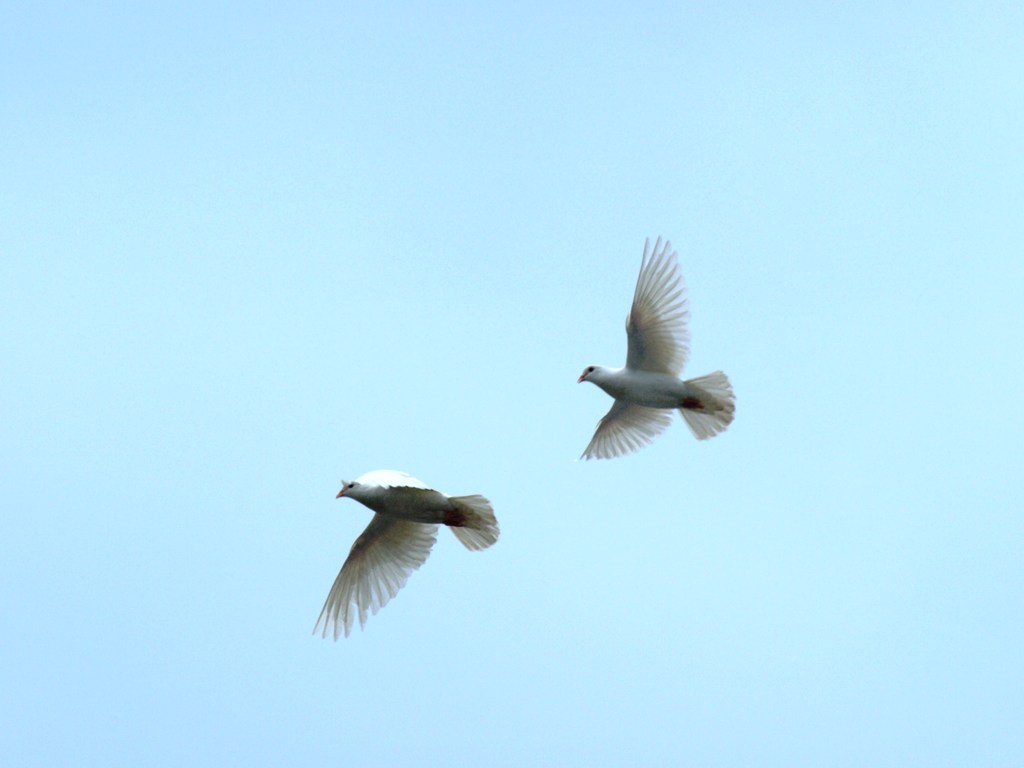 一雙雪白的原鴿在空中的姿態。